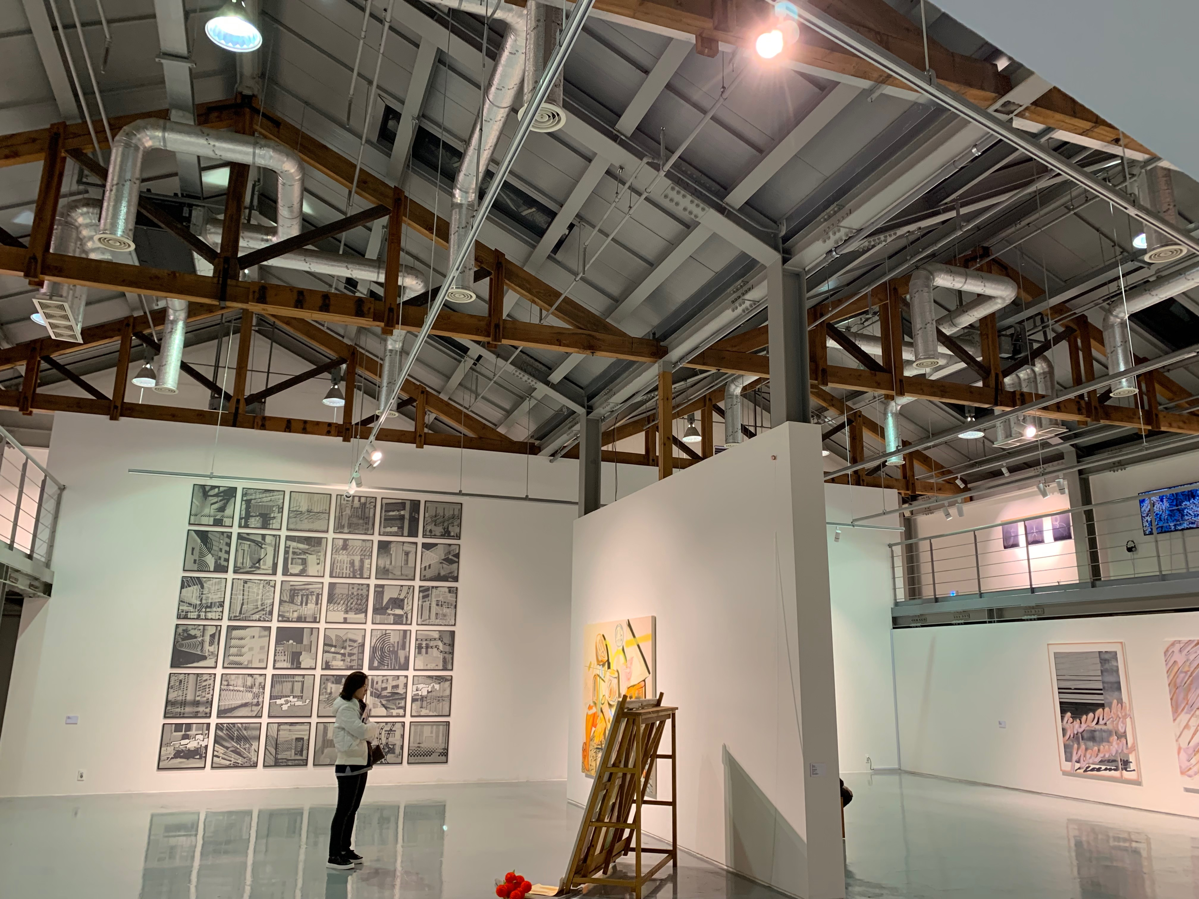 인천아트플랫폼(옛 대한통운 창고)